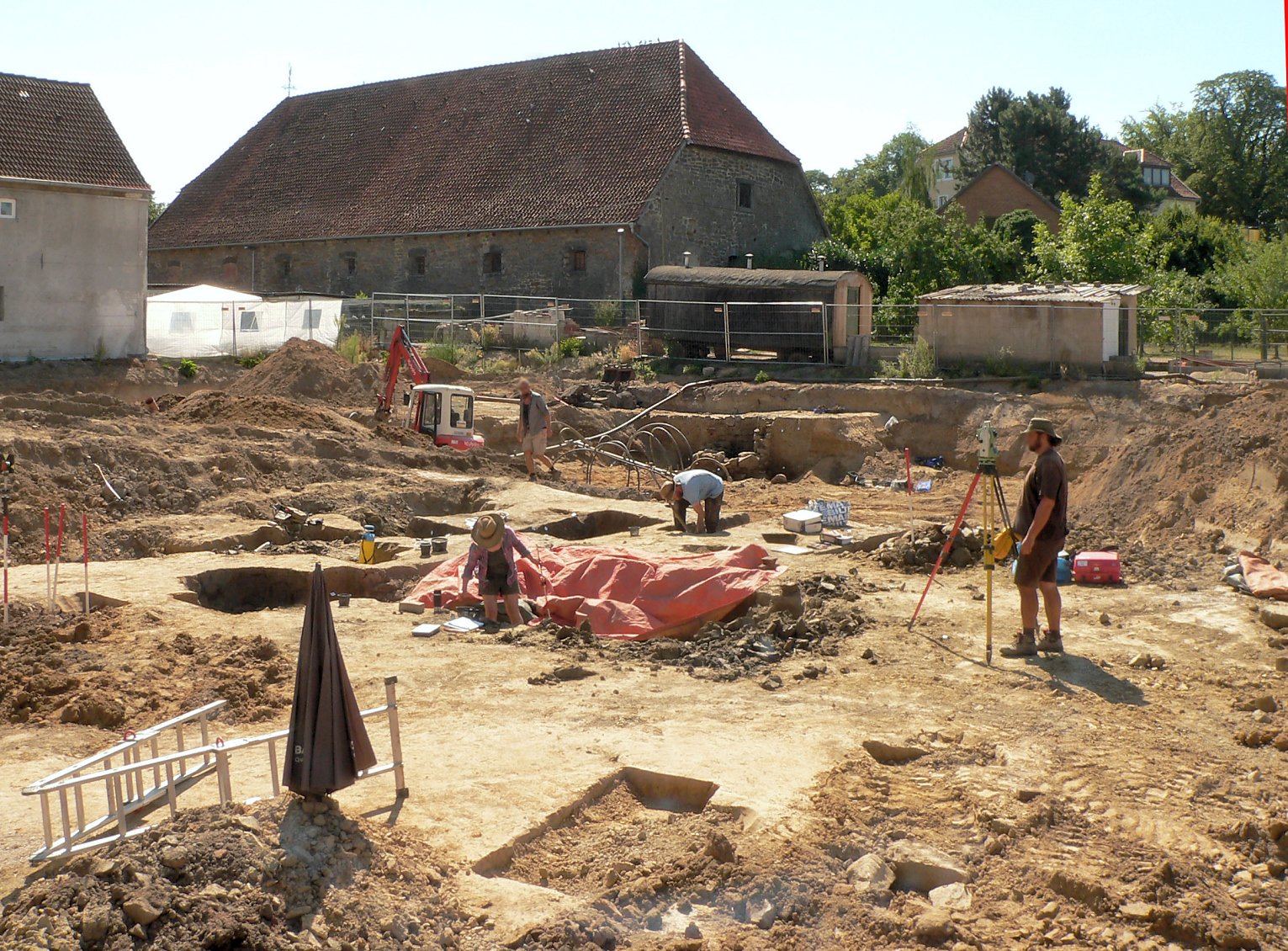 Weidemannscher Hof